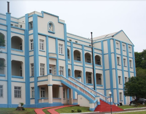 A Faculdade Santo Ângelo situa-se no prédio do antigo Seminário da Congregação dos Missionários da Sagrada Família.